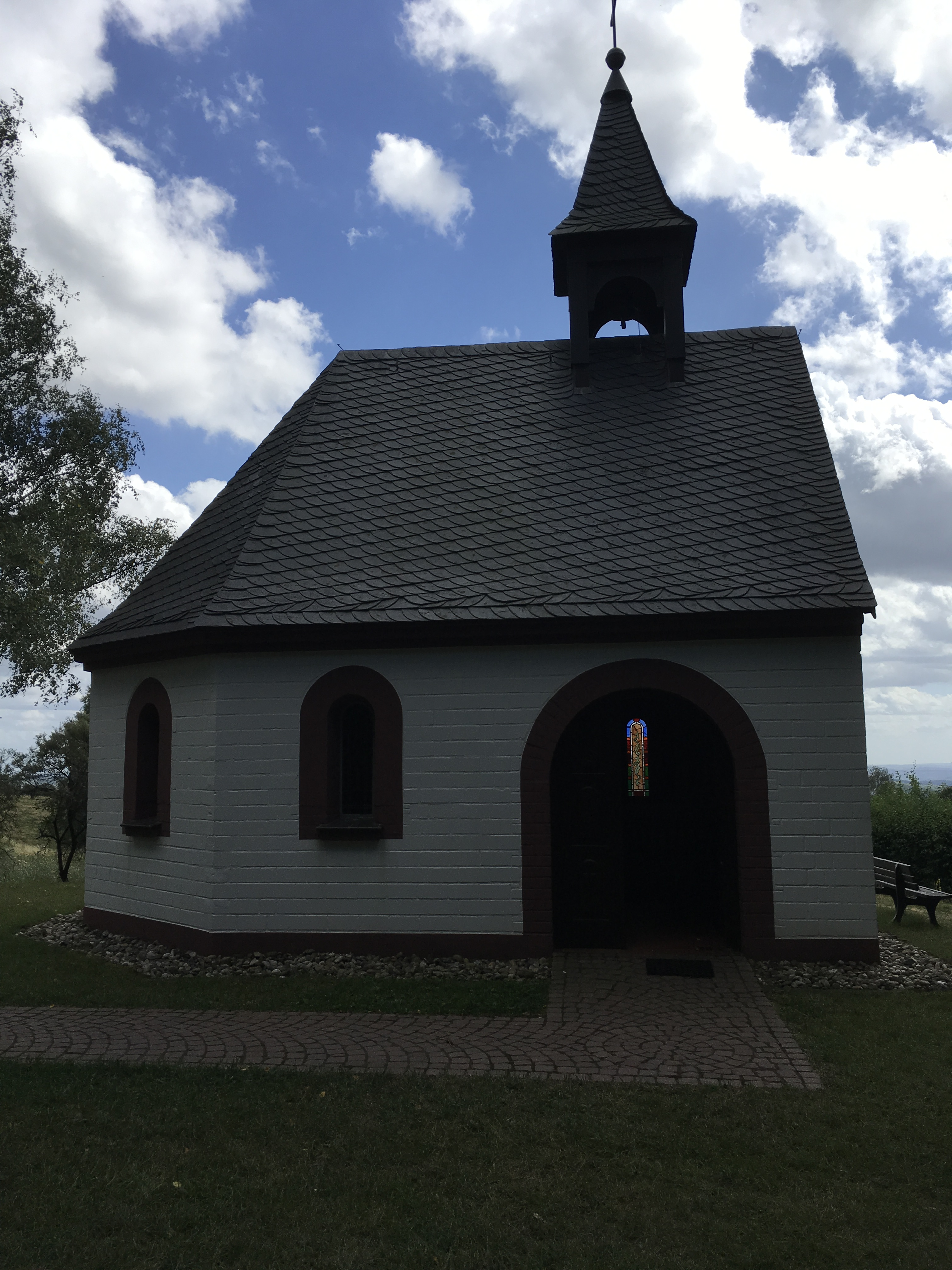 Peterbergkapelle Ansicht Nordseite mit offenem Portal